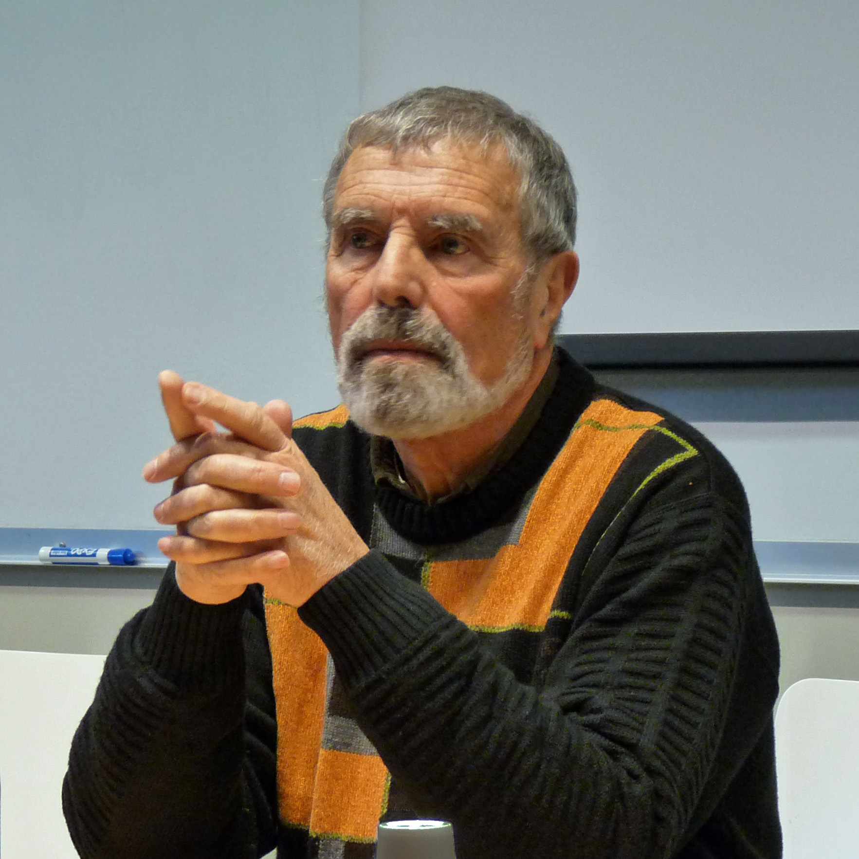 Conférence de Roger Odin (théoricien du cinéma et ancien professeur de sciences de l'information et de la communication à l'Université de Paris III) au Collège doctoral européen de Strasbourg, sur le thème "Les inédits : une source pour l'histoire. Apports, problèmes, perspectives".